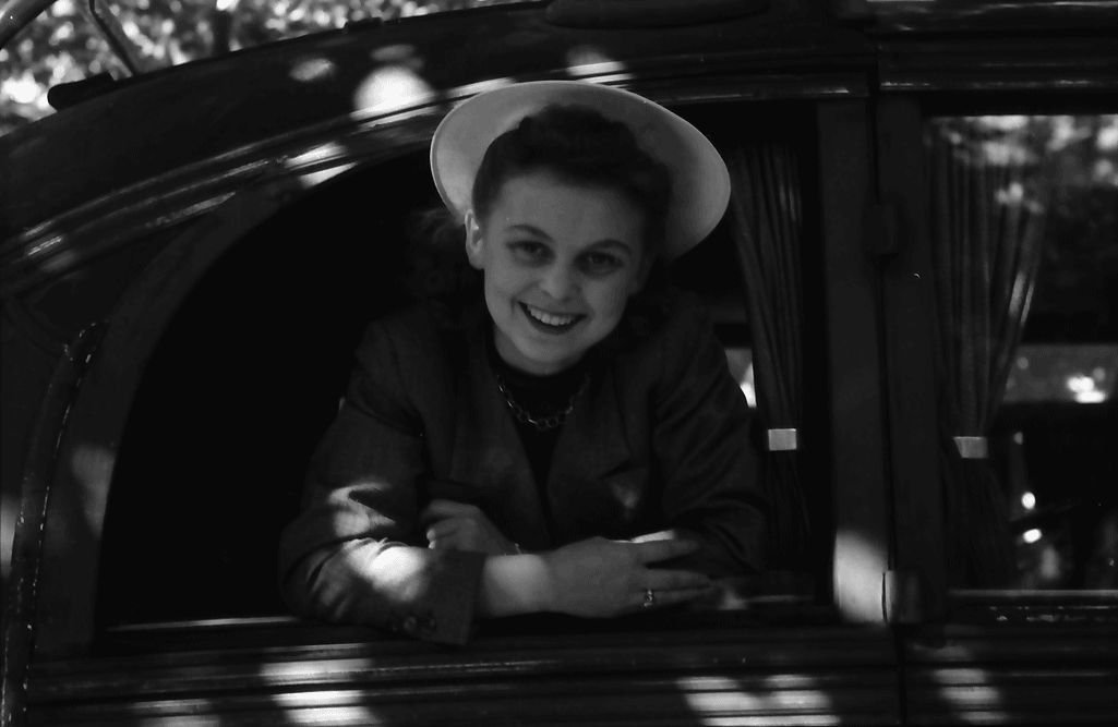 Bukarest: Bruni Löbel, Porträt im Autobus